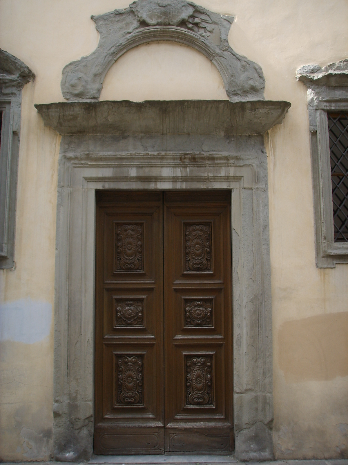 Conservatorio delle mantellate, portale